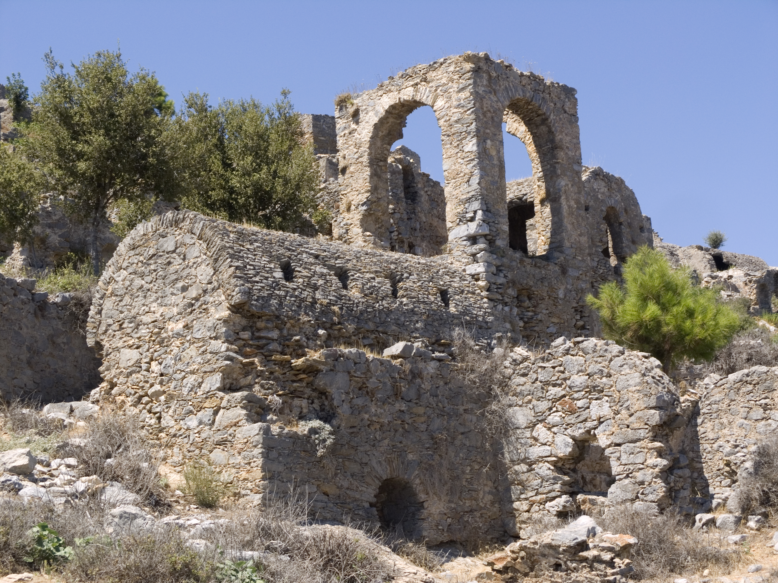 Турция, Анамур – Анемуриум